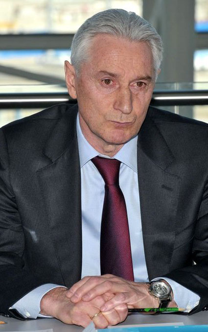 Главный тренер сборной России по хоккею Зинэтула Билялетдинов на встрече с представителями спортивных федераций по хоккею и фигурному катанию.